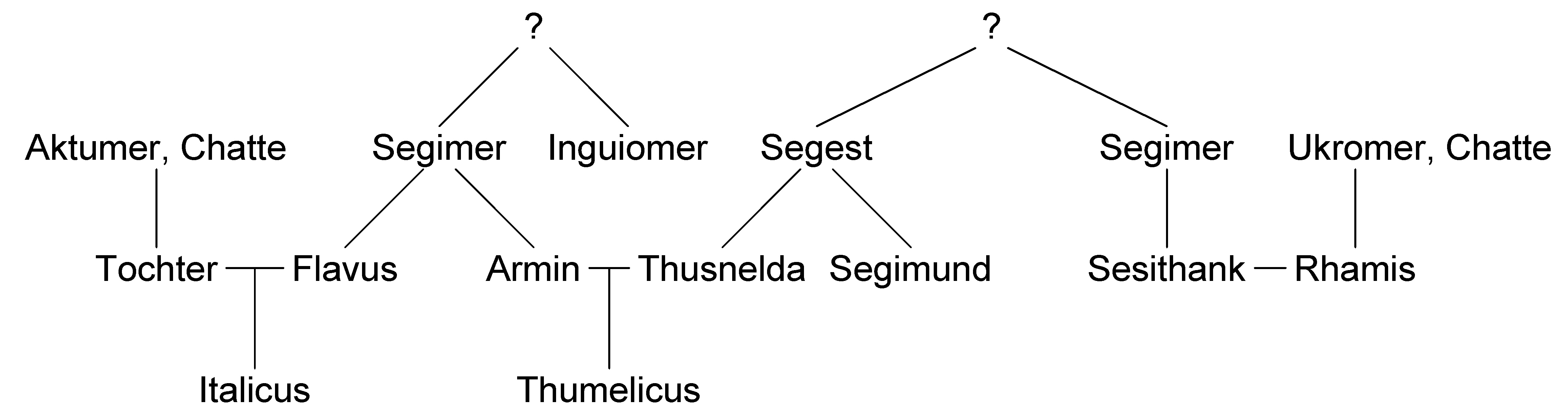 Stammbaum des Arminius Quelle: Allgemeine Deutsche Bibliothek